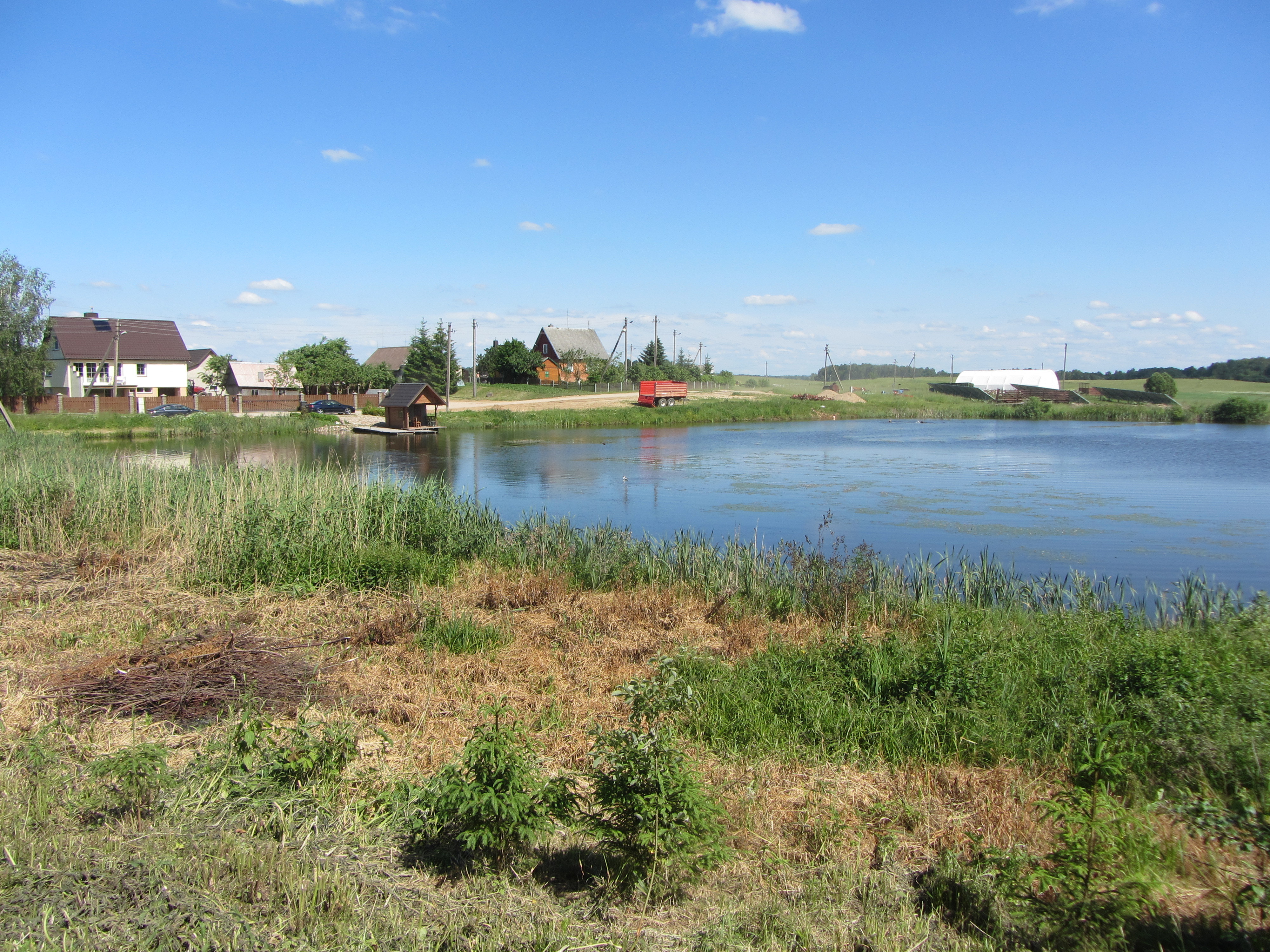 Laumėnai, Lithuania